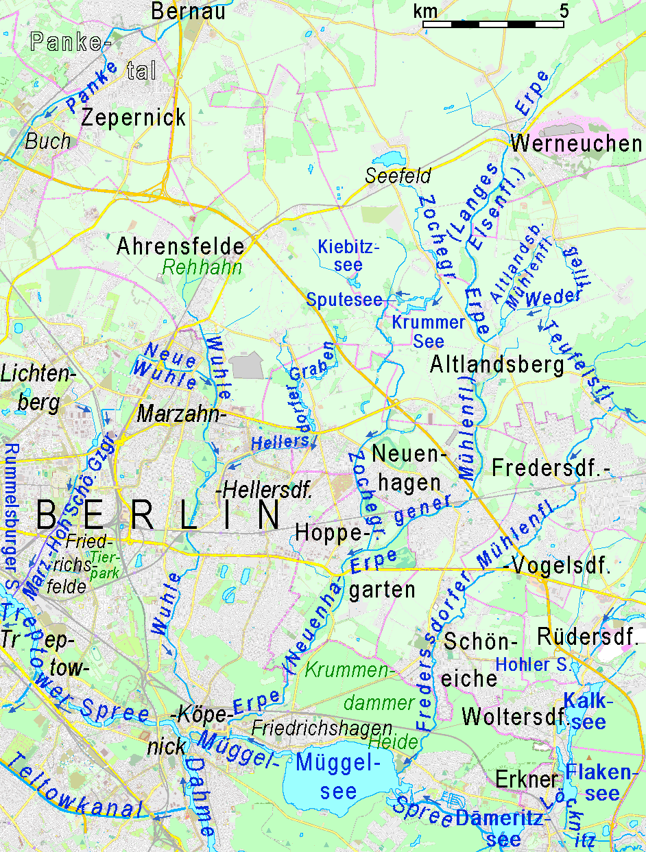 Nordöstliche Berliner Spreezuflüsse: Marzahn-Hohenschönhauser Grenzgraben, Wuhle, Erpe, Teile des Fredersdorfer Mühlenfließes